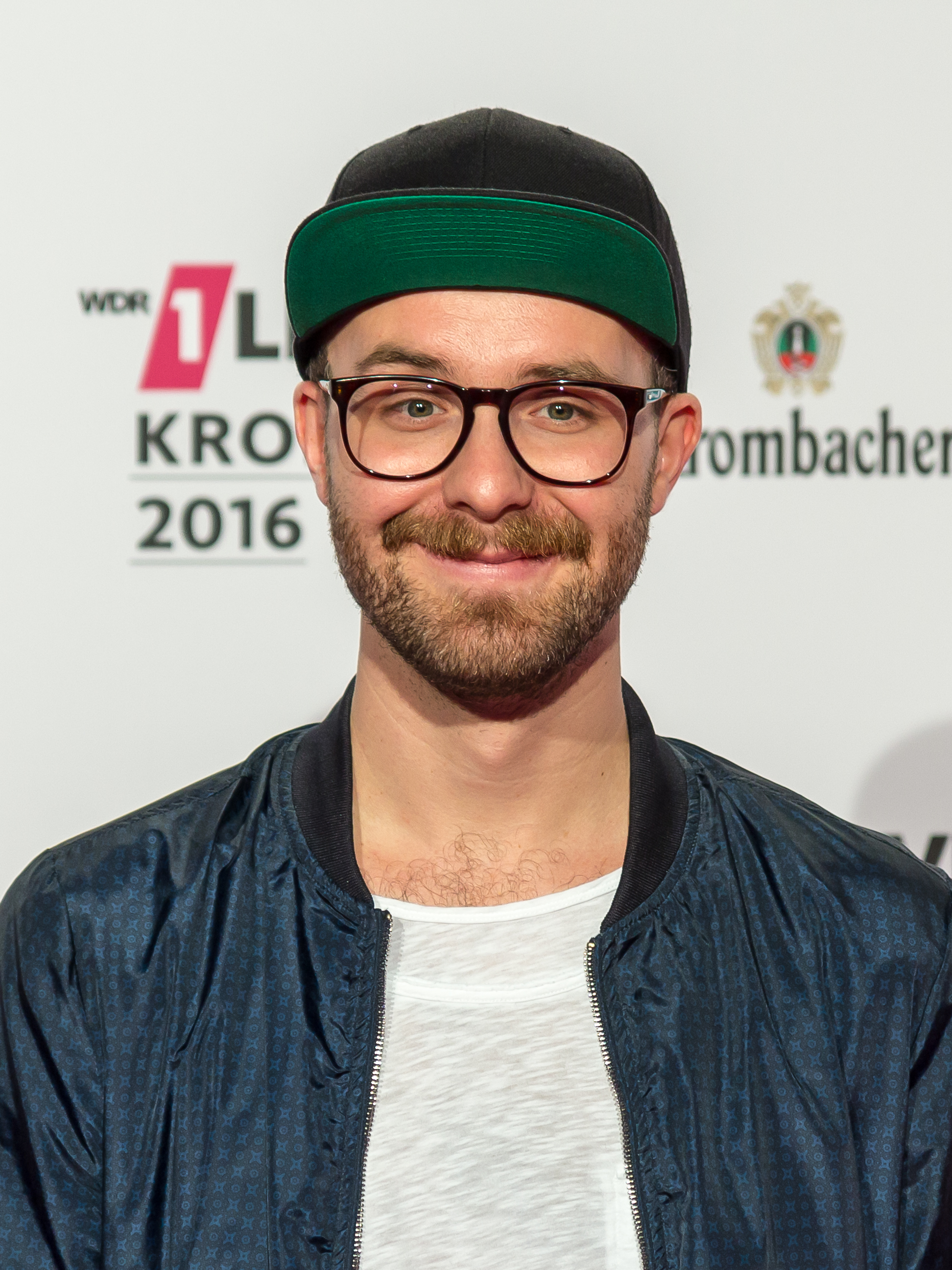 1LIVE Krone 2016 - 1700 - Roter Teppich - Mark Forster